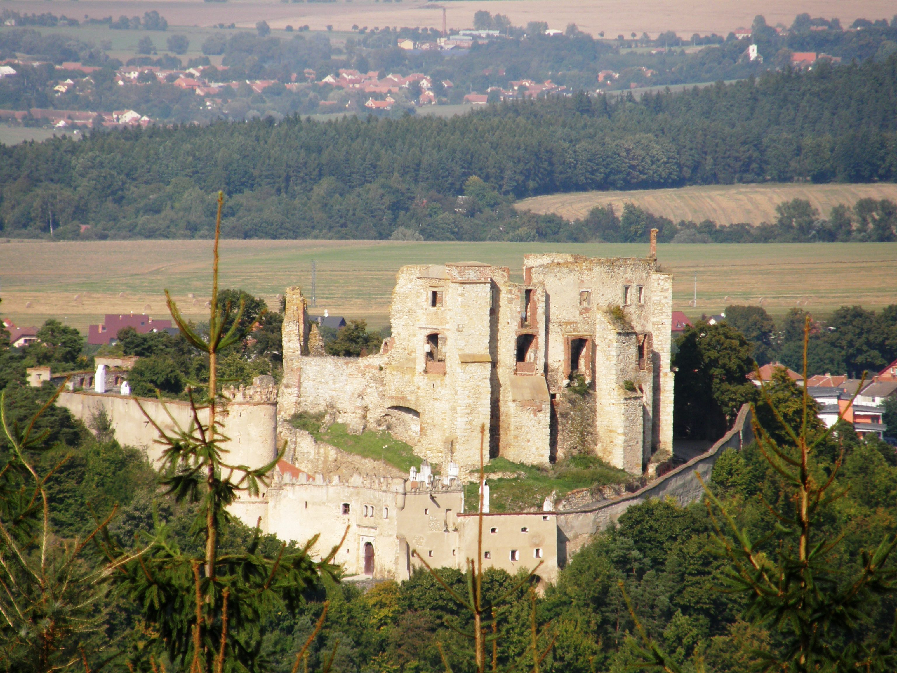 Boskovický hrad - pohled od Újezdu u Boskovic